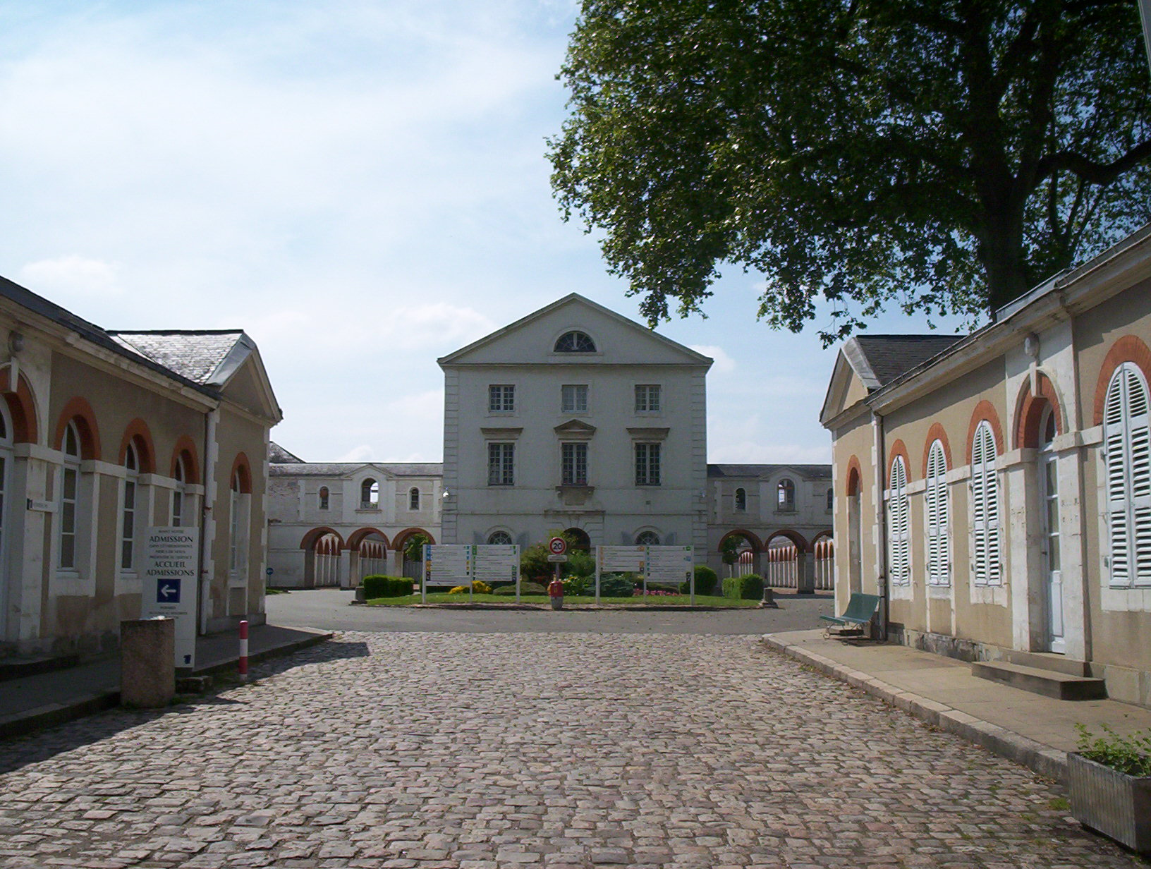 L'hôpital spécialisé du Mans, appellé Etoc-Demazy, classé monument historique depuis 2001.